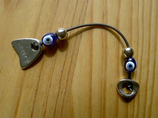 photographie d'un objet de divertissement grec, le Begleri.